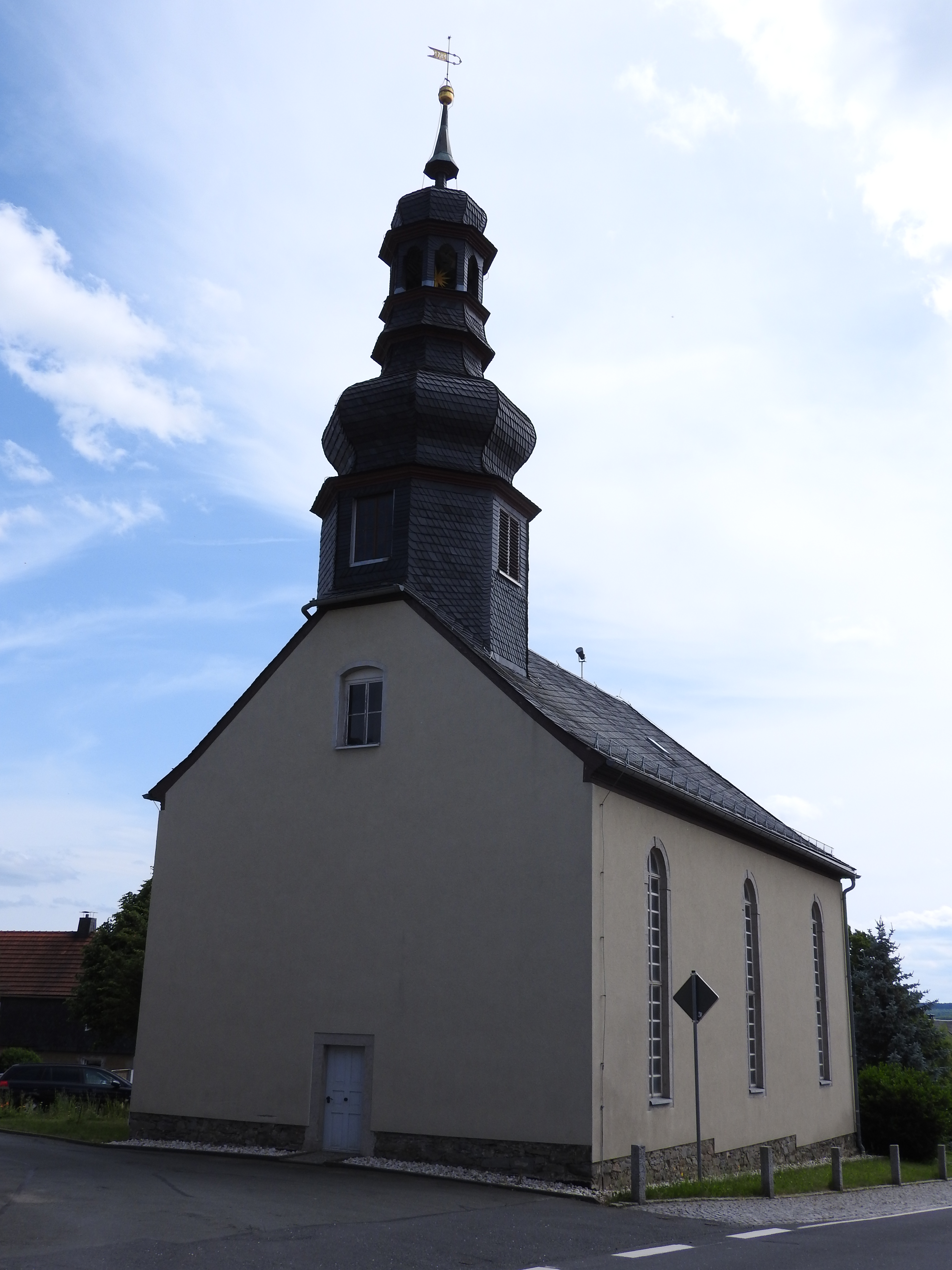 Kirche in Eßbach, Thüringen